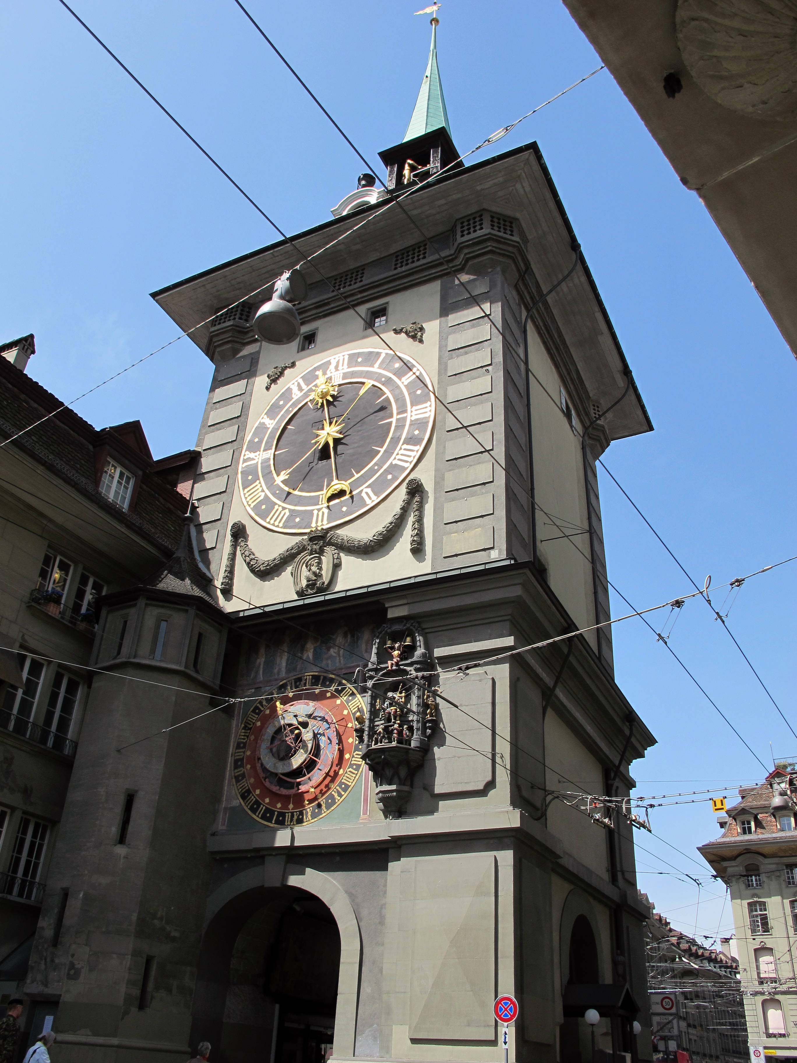 Berna, Svizzera